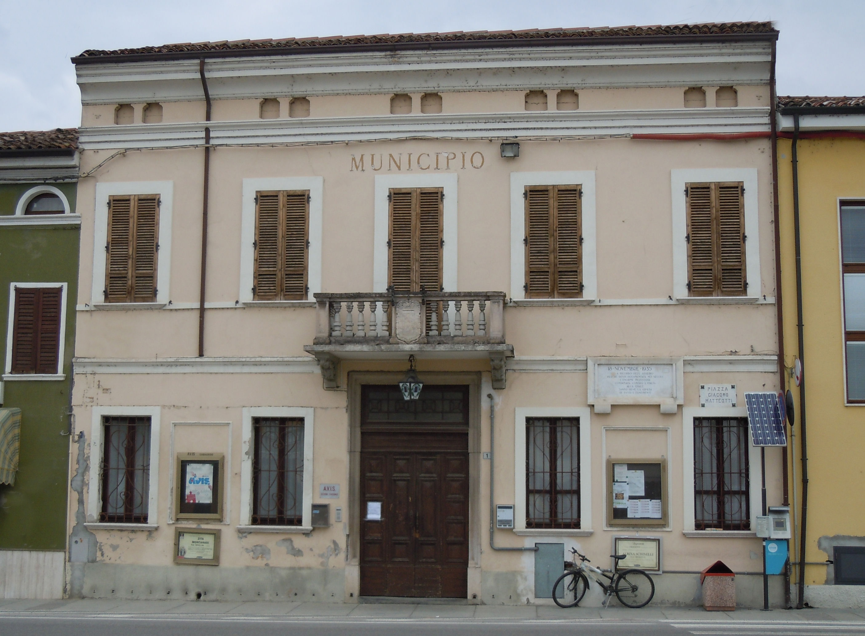 Casaloldo, vecchio Municipio.